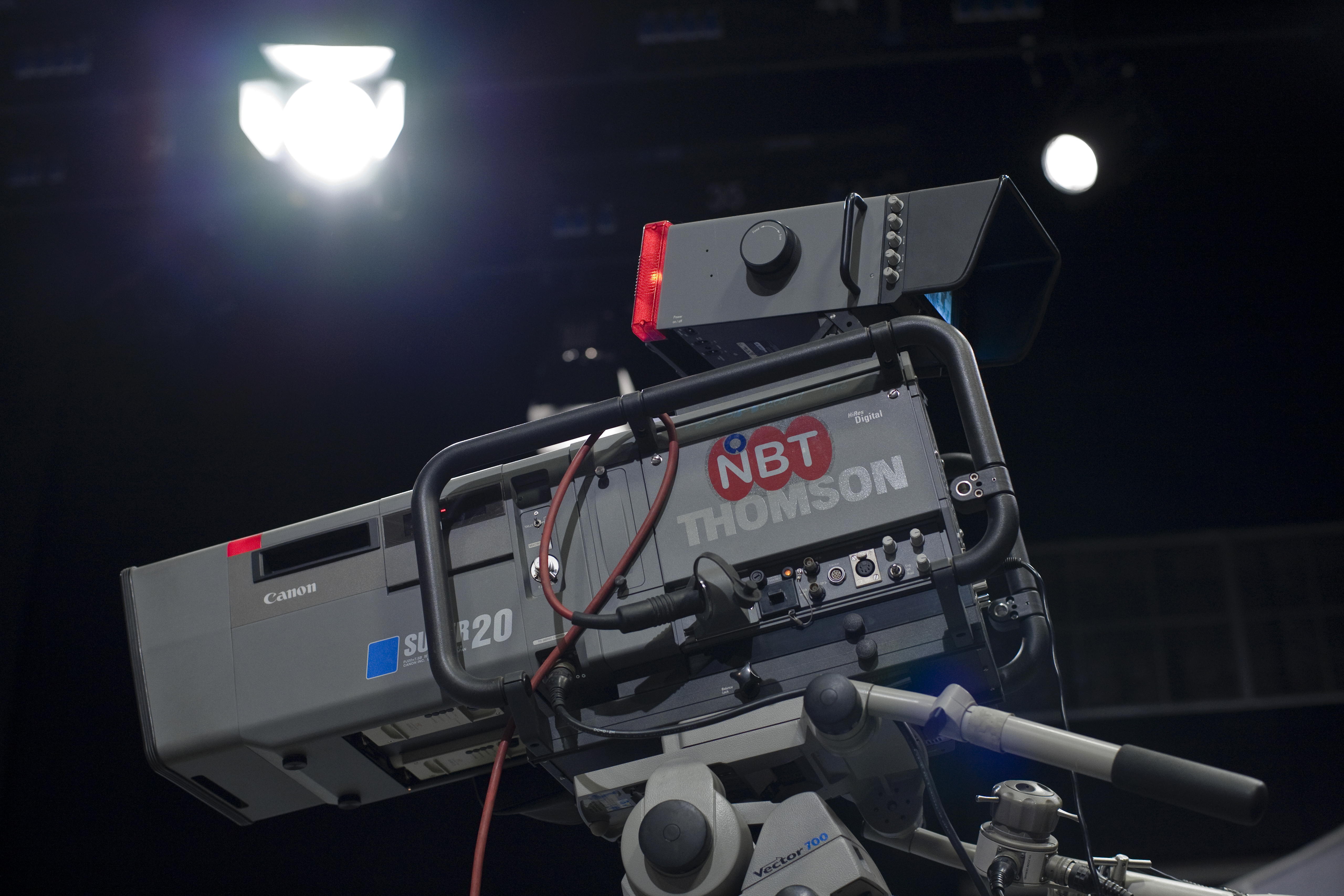 นายกรัฐมนตรี ร่วมงานใจประสานใจ ช่วยภัยน้ำท่วม ณ สถานีวิทยุโทรทัศน์แห่งประเทศไทย NBT วันอาทิตย์ที่ 3 เมษายน พ.ศ.2554 (Photographer attached to the Prime Minister of the Kingdom of Thailand (H.E.Mr.Abhisit Vejjajiva) : Peerapat Wimolrungkarat / พีรพัฒน์ วิมลรังครัตน์) @is50mm